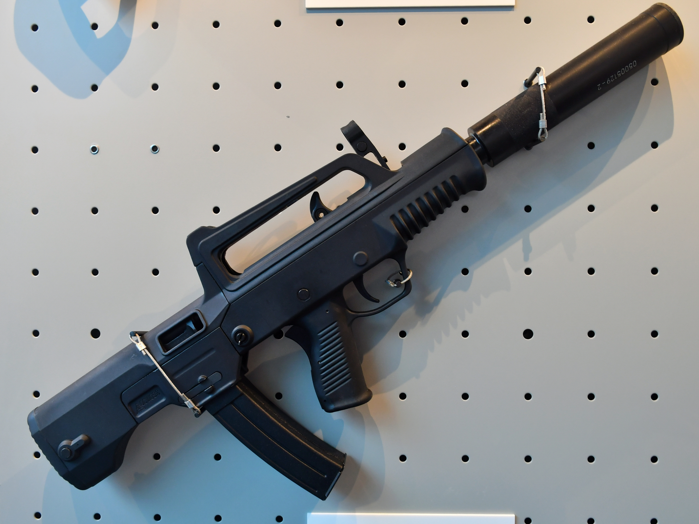 05式5.8毫米微声冲锋枪